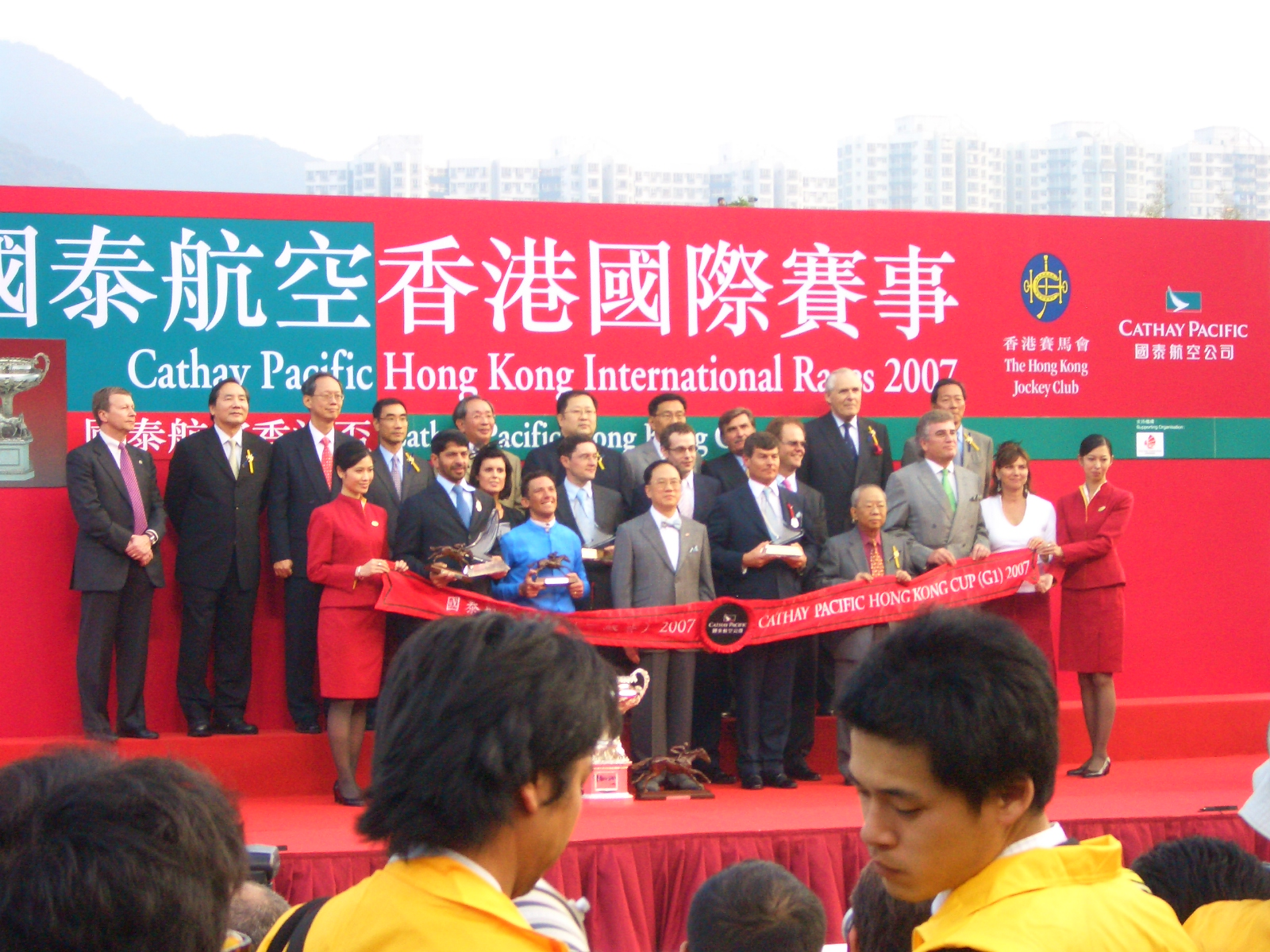 2007年香港盃冠軍威滿蹄（Ramonti）的頒獎儀式